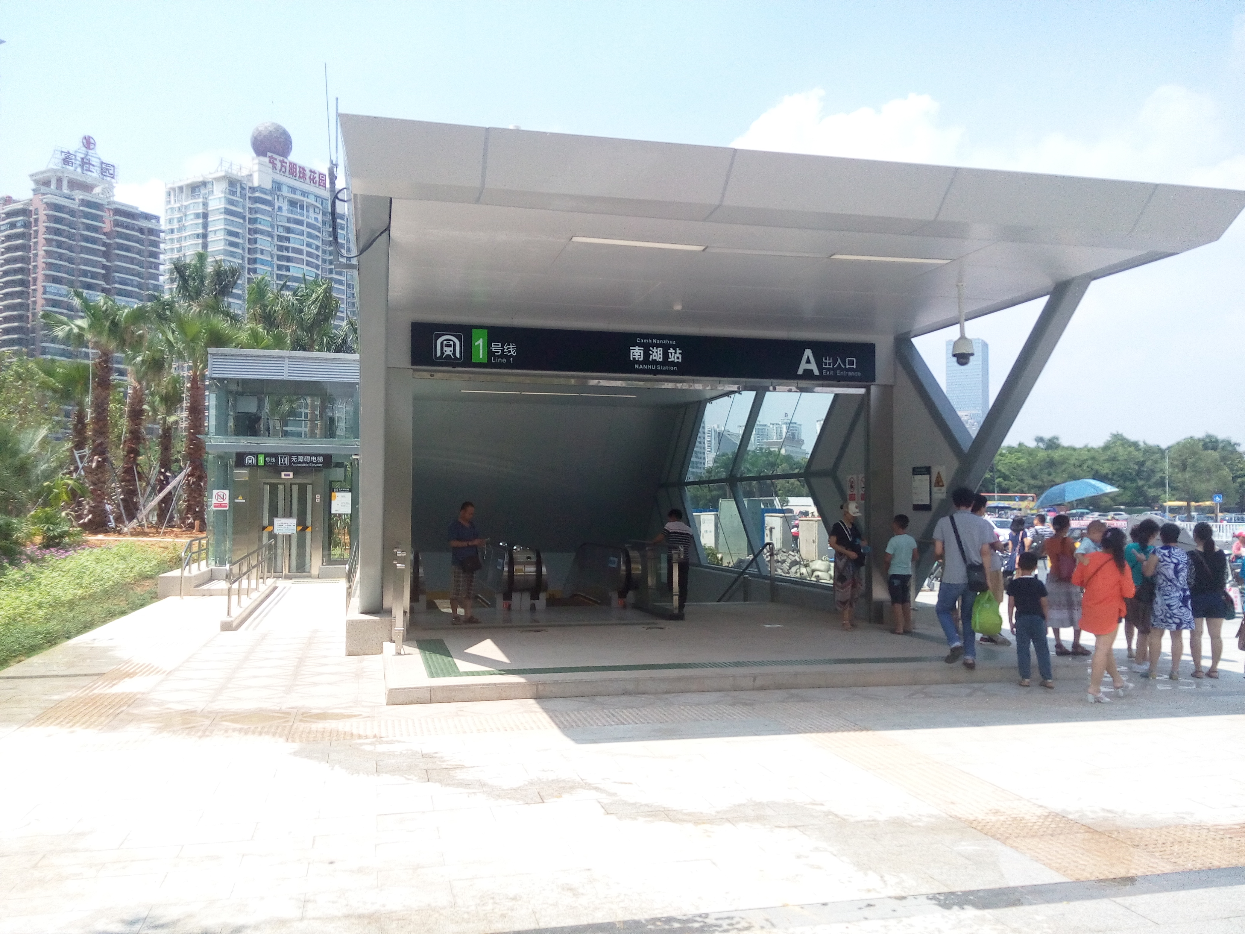 中文（中国大陆）: 南宁轨道交通